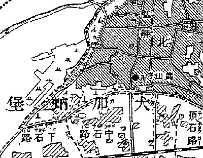 臺灣堡圖－艋舺中的大加蚋堡截圖。本圖1904年出版，距今已越百年，版權過期。